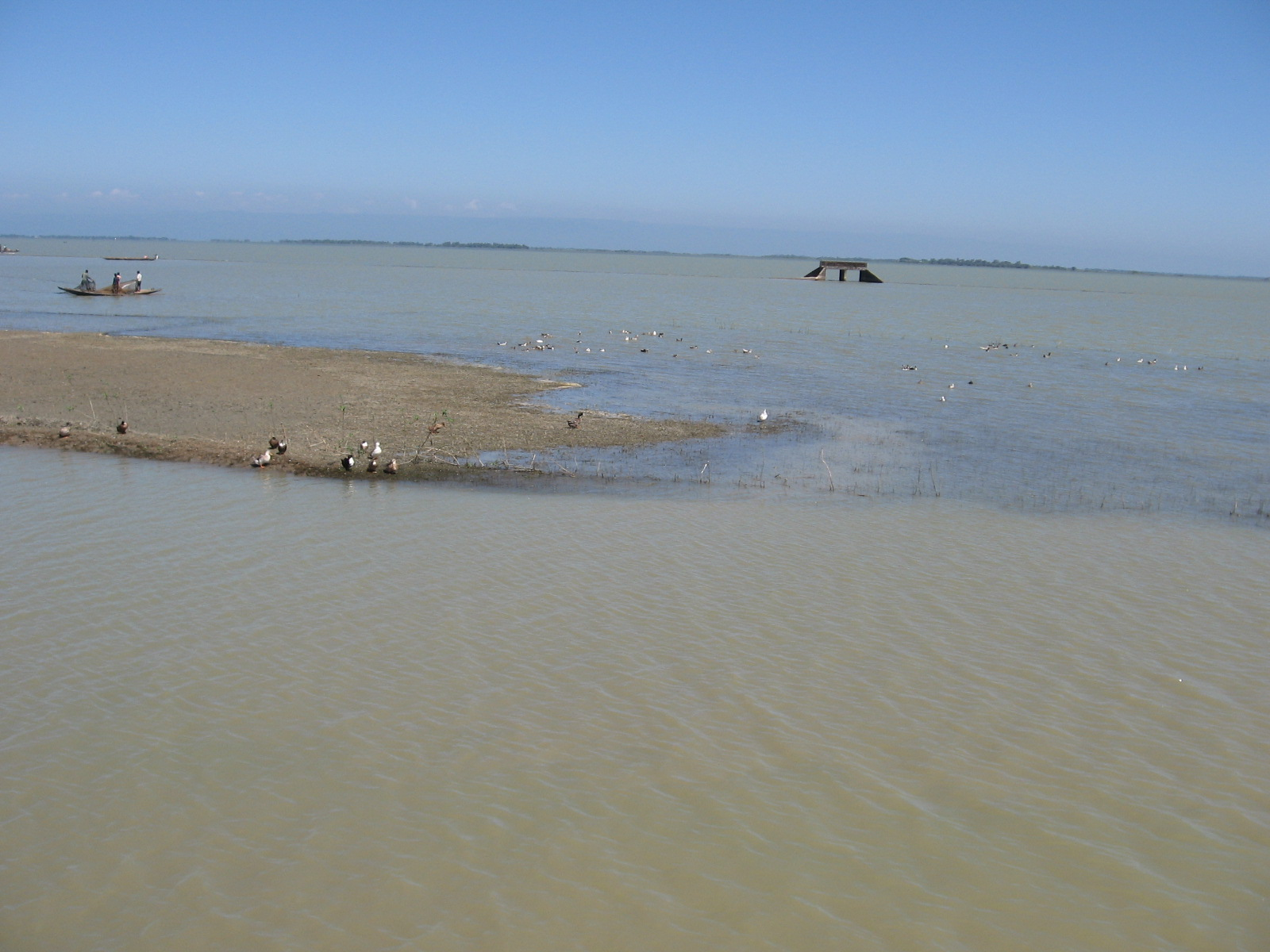 A haor adjacent to Surma